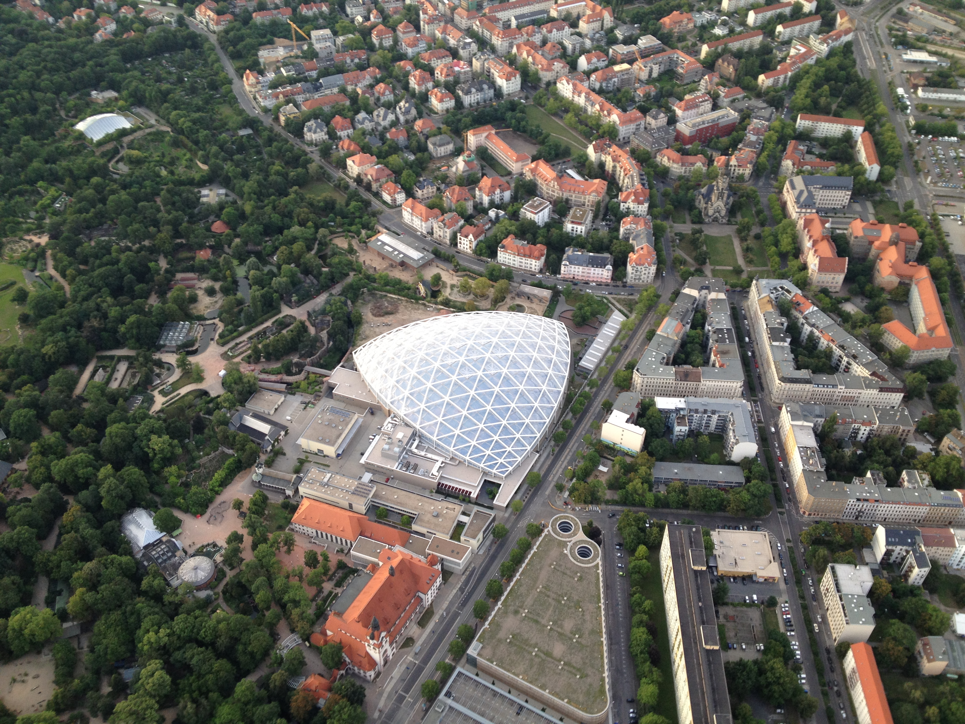 Gondwanaland des Zoo Leipzis sowie Teile von diesem. Ebenso ist im Hintergrund Pongoland zu erkennen.